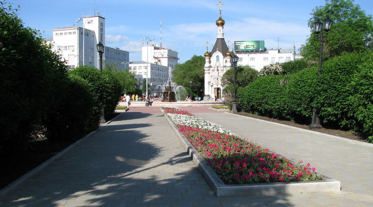 Екатеринбург. Площадь Труда и фонтан «Каменный цветок»